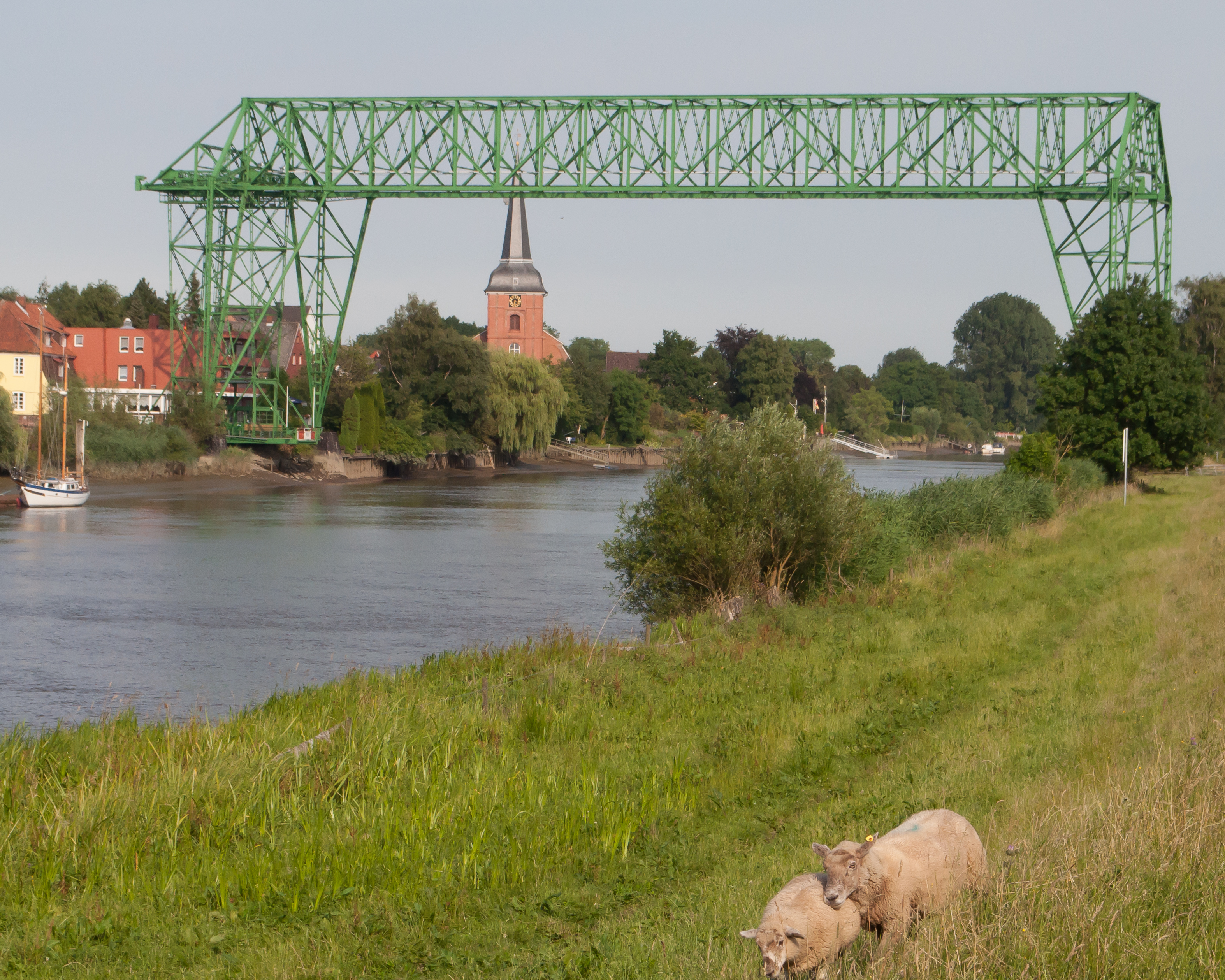 Schwebefähre Osten mit St. Petri-Kirche. This is a photograph of an architectural monument. .204.400.011